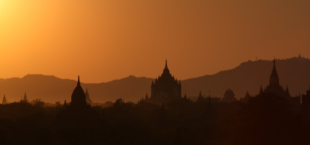 Bagan Sunset